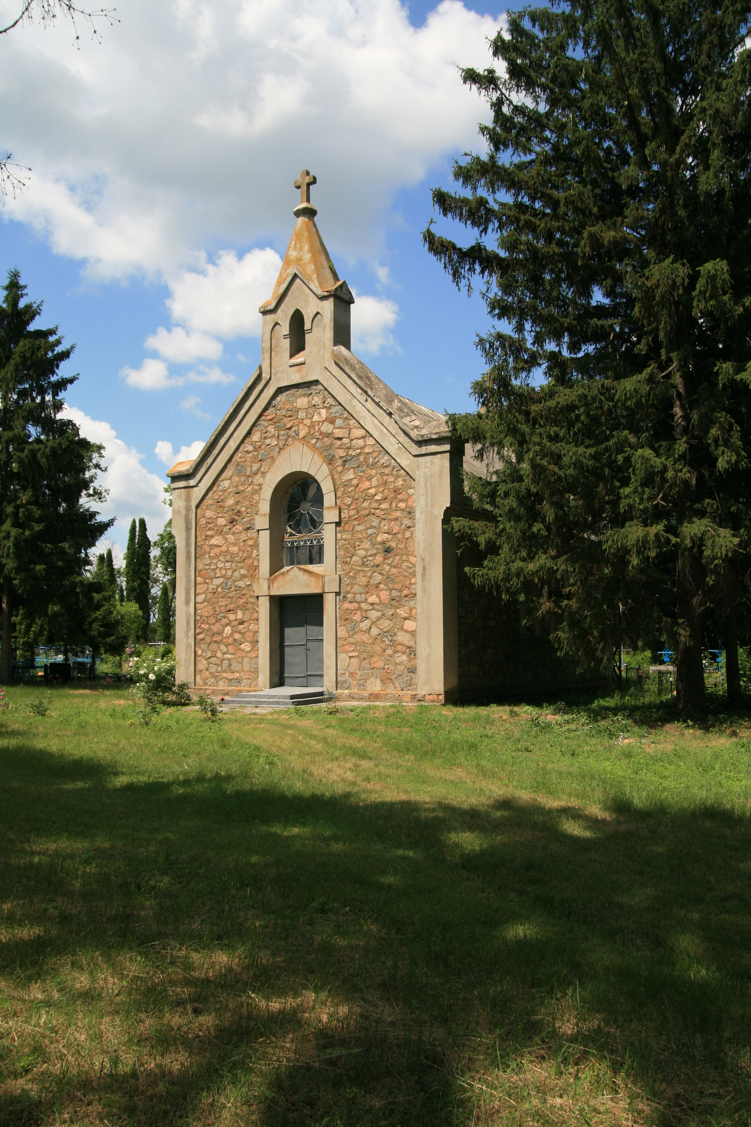 Костьол на кладовищі, село Безпечна